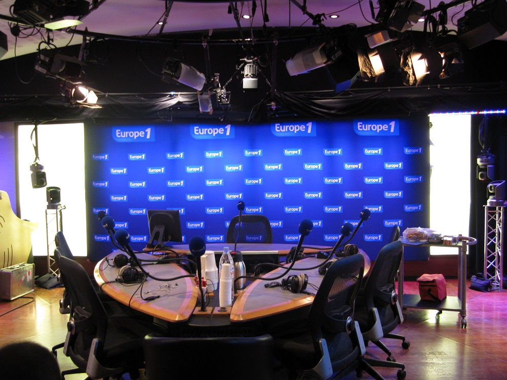 Vue du studio Merlin à Europe 1, Paris, France.